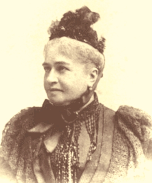 gróf széki Teleki Sándorné Litez de Tiverval Mathilde (1836–1910)